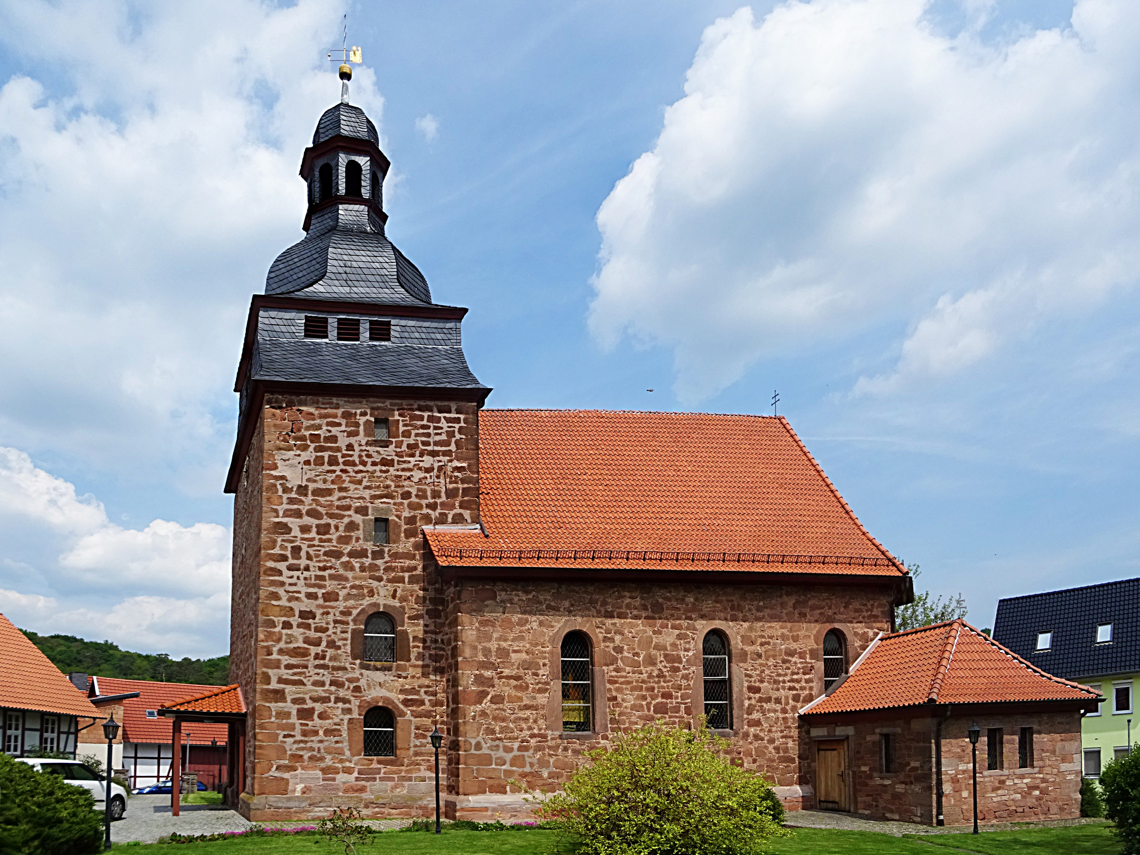 Dorfkirche St. Nikolaus (Neuendorf) von Süden